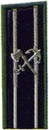 Российская империя; Министерство путей сообщения; Знаки различия петлица Коллежский советник — гражданский чин VI класса в Табели о рангах. (Соответствовал чинам армейского полковника и флотского капитана I ранга.).